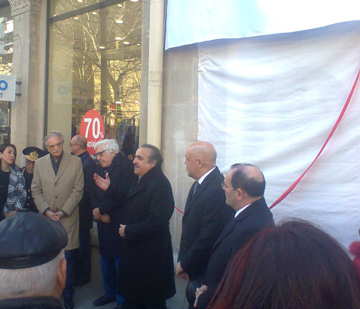 Открытие барельефа Васифу Адыгёзалову 18.02.2020. На фотографии писатель Анар и артист Полад Бюль-Бюльоглы, перед открытием